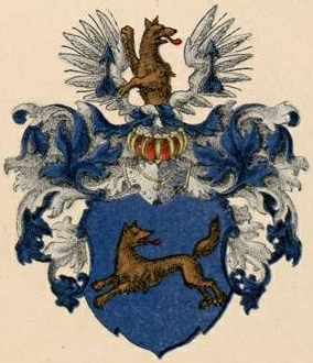 Wolffeldti suguvõsa aadlivapp